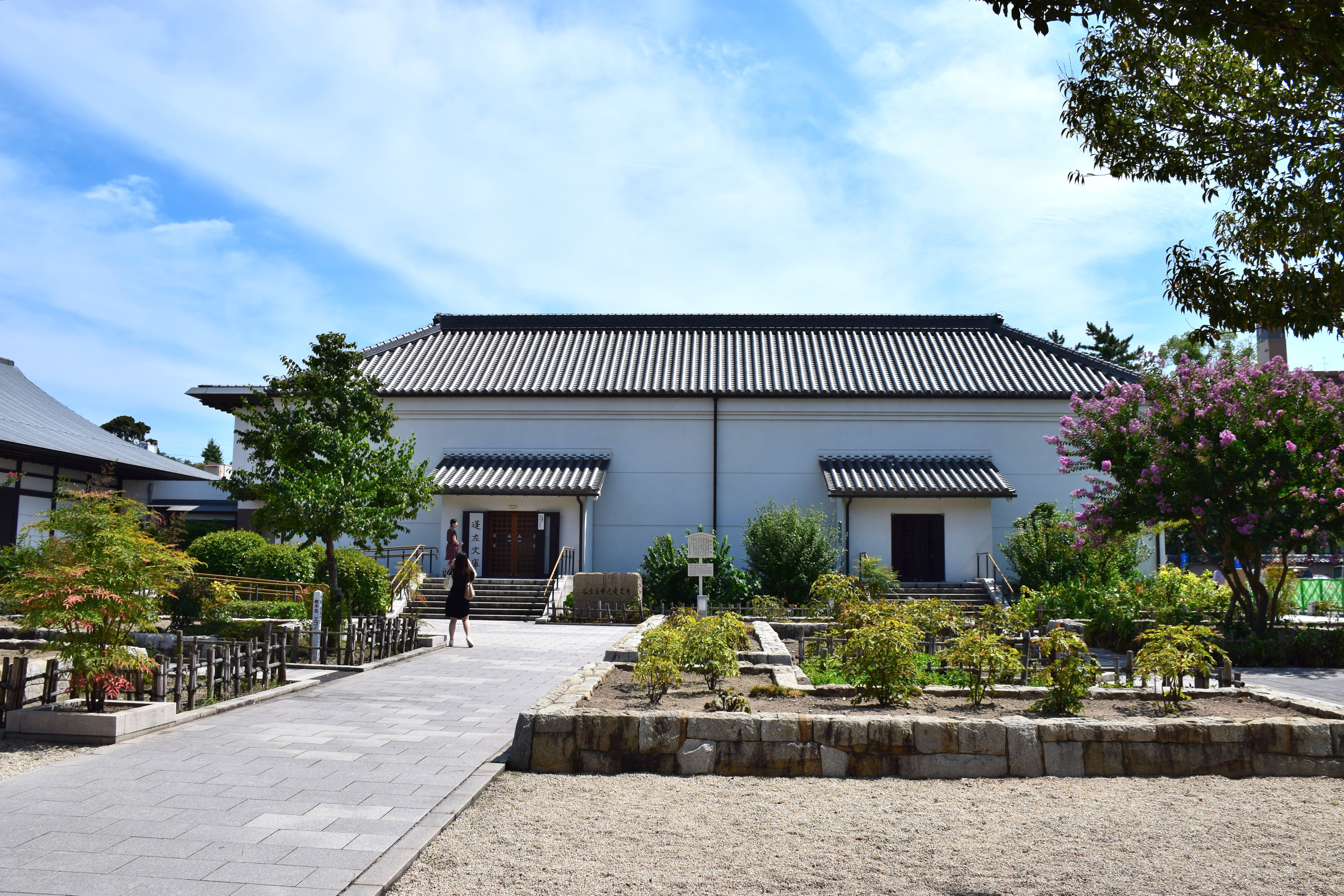 名古屋市蓬左文庫